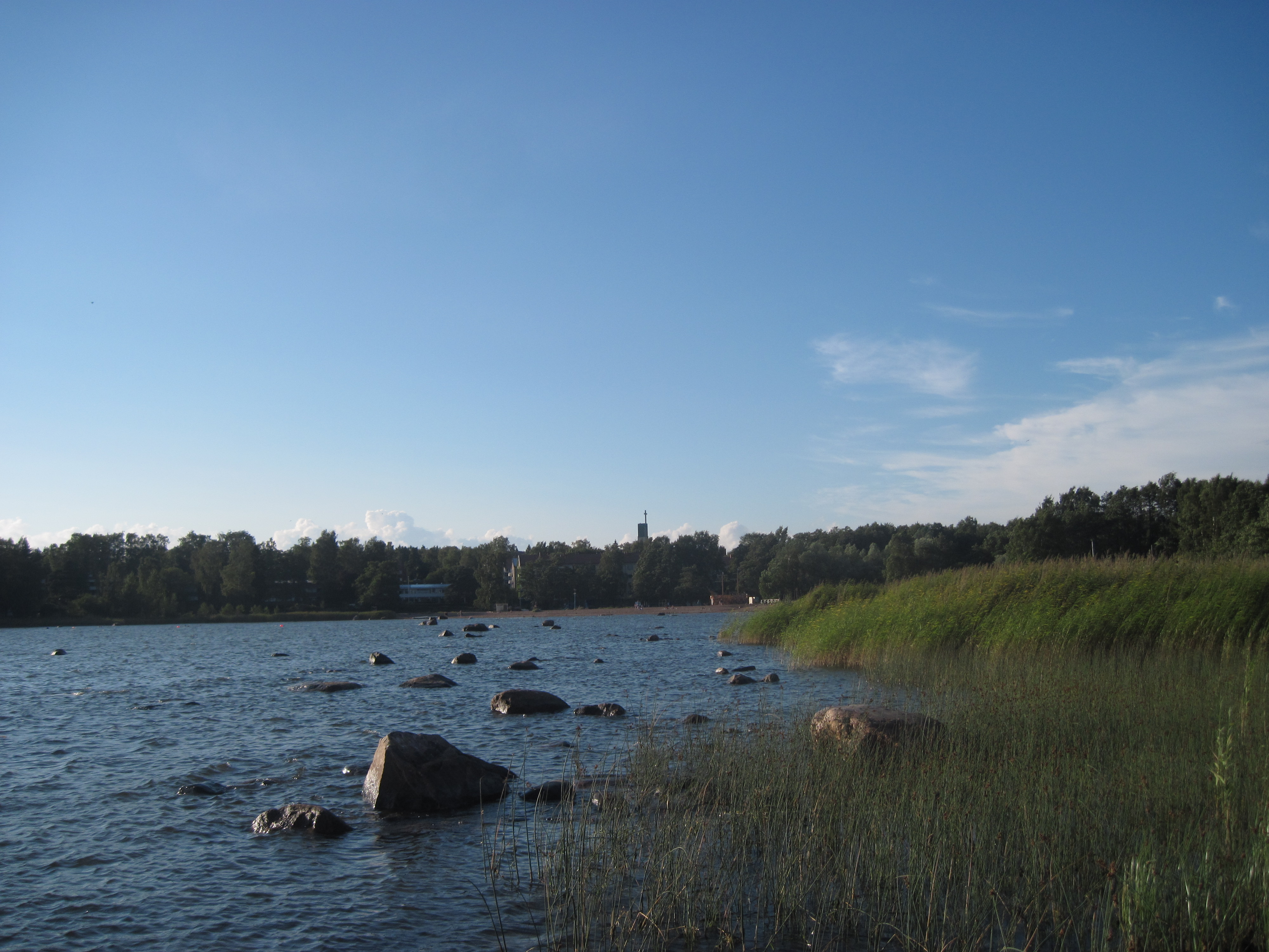 Merikylpyla Park in Lauttasaari, Helsinki, as seen from South